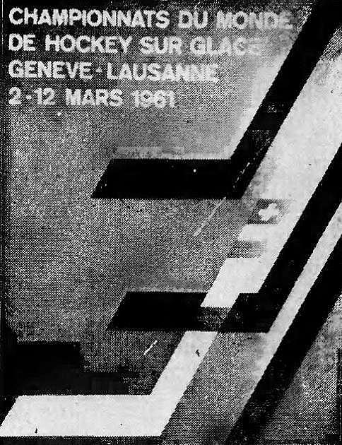 Official poster of 1961 IIHF World Championship, 2-12 March 1961, Geneve and Lausanne